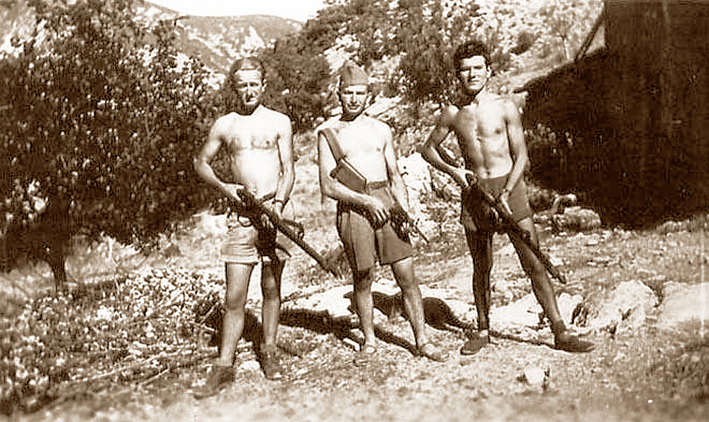 Deux maquisards, entourant leur chef Marius Audibert, au camp FTP de La Roche-Saint-Secret en mai 1943.